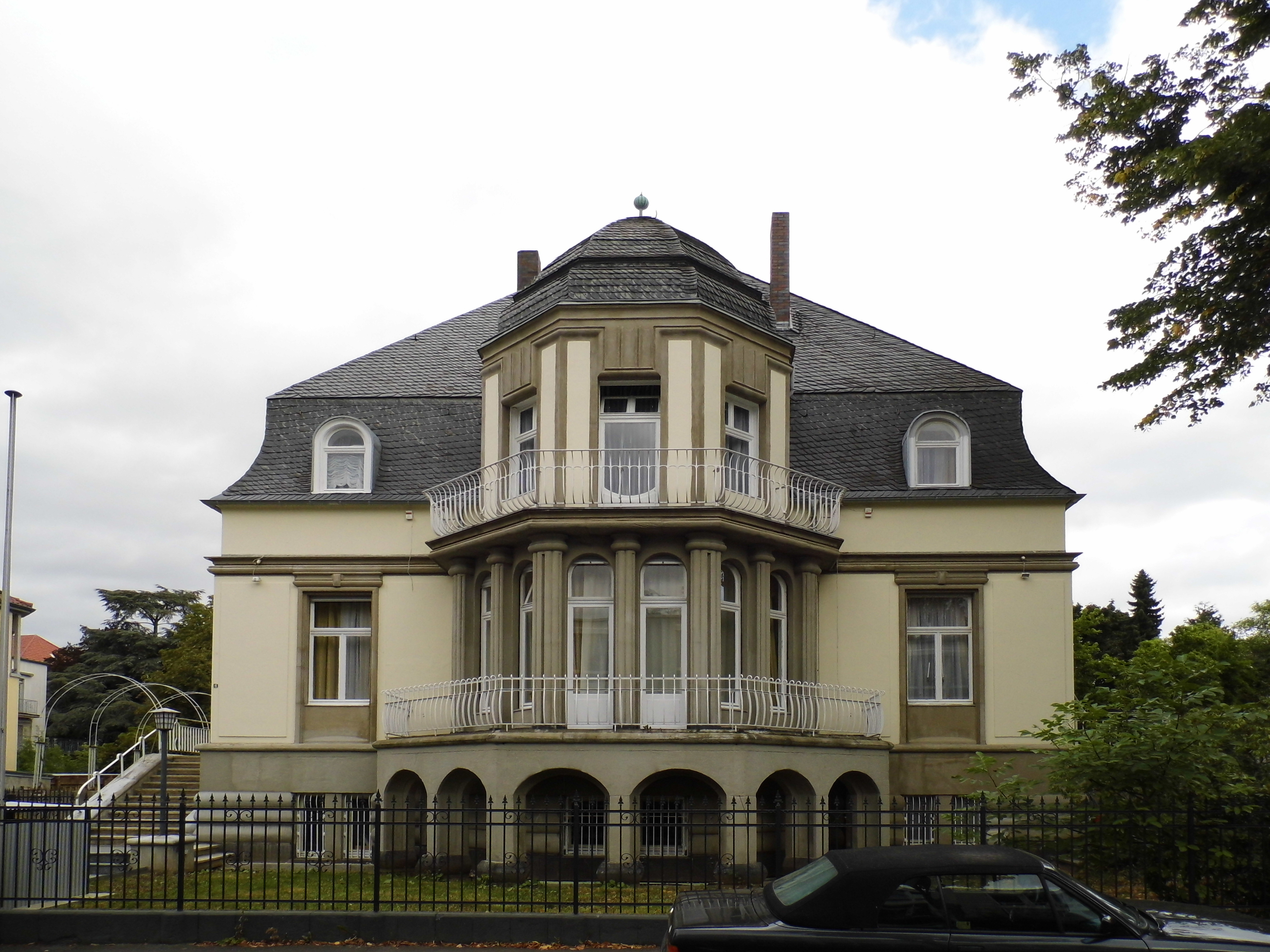 Denkmalgeschützte Villa Kronprinzenstraße 6 (ehem. Botschaft von Island) in Rüngsdorf, Bad Godesberg